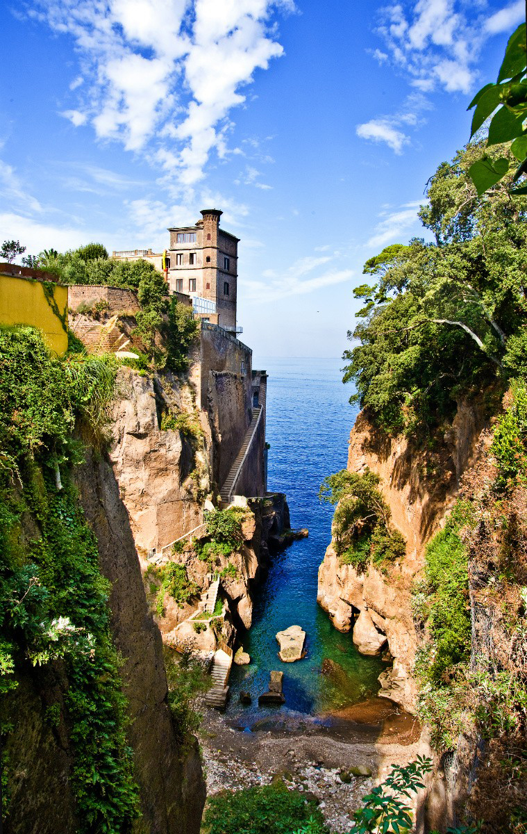 Scorcio del Golfo del Pecoriello, Sant'Agnello